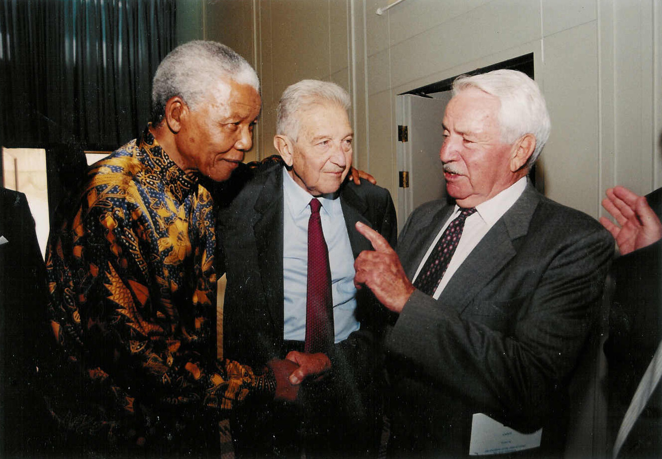 סיד כהן, עזר ויצמן ונלסון מנדלה